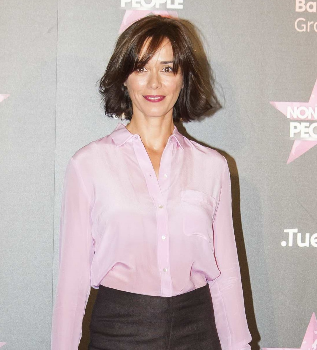 Fanny Gautier. Fotos del photocall y fiesta de lanzamiento de un nuevo canal de televisión en España.